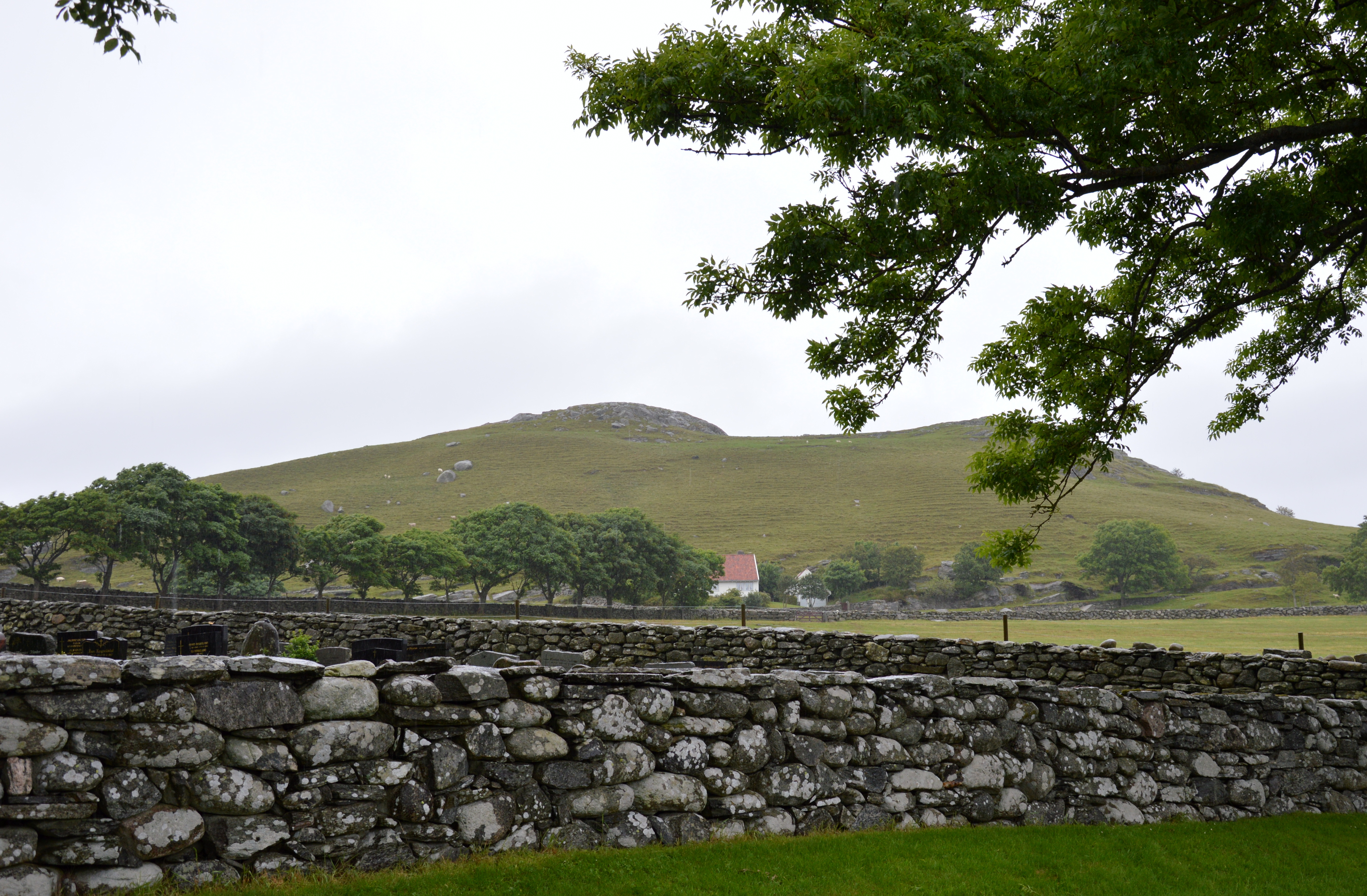 Ramnafjellet